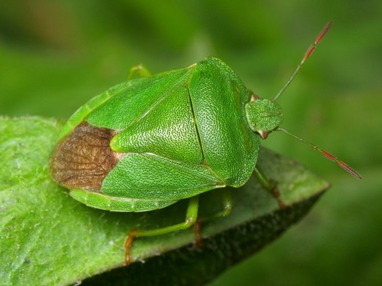 Ukrajina